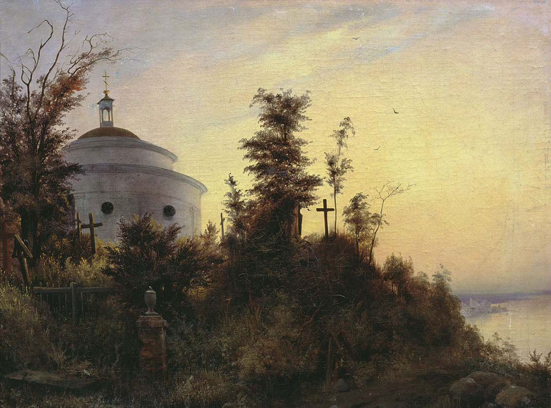 Askold's Grave.